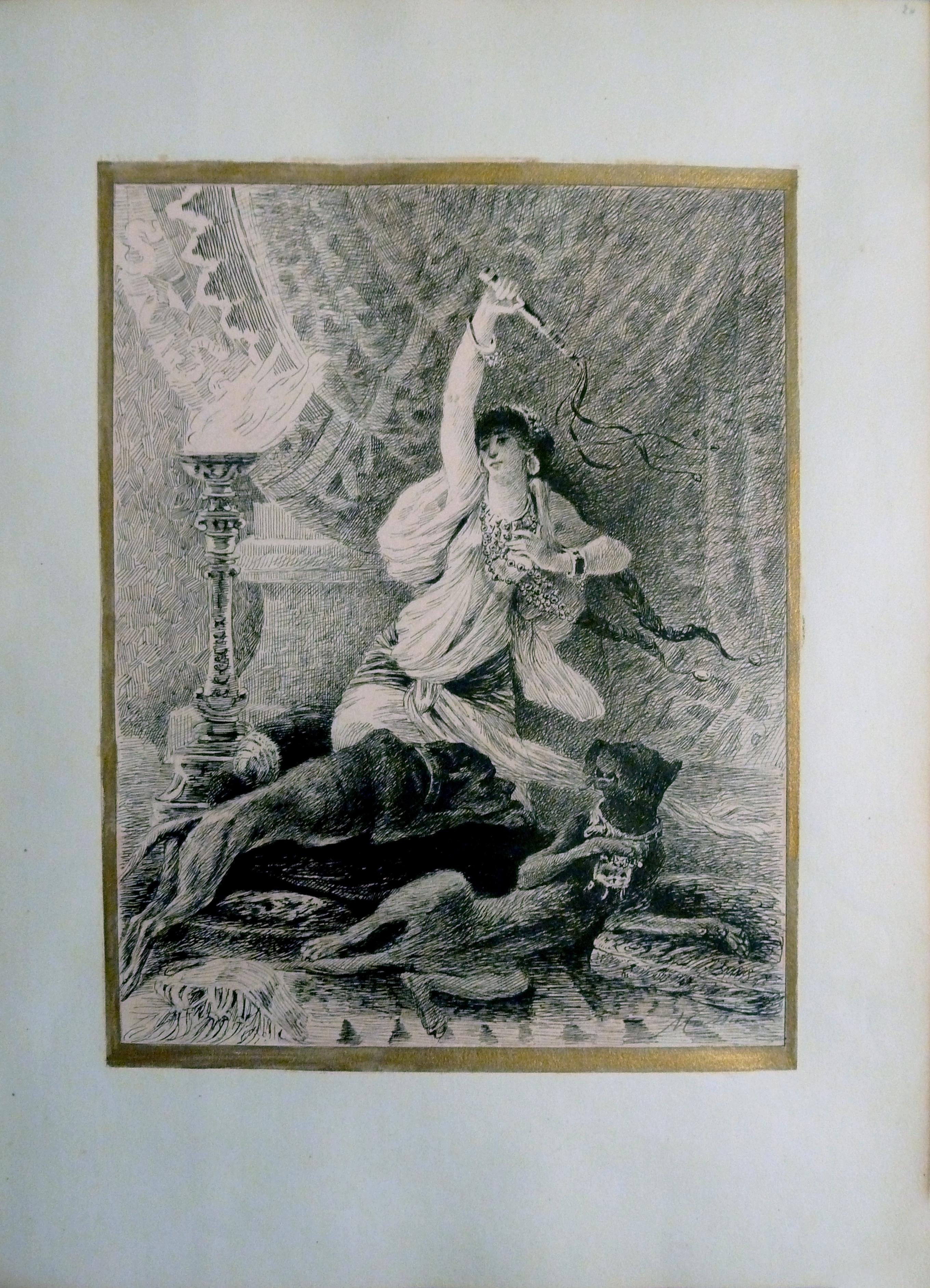 Illustrations (incomplètes) des Mille et une nuits de Victor Masson.